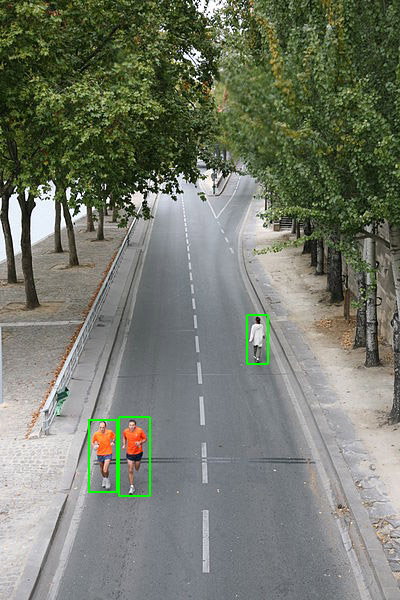 Pedestrian detection example